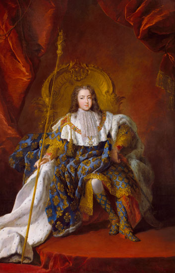 Subject: Sa Majesté le Roi Louis XV de France ; adolescent